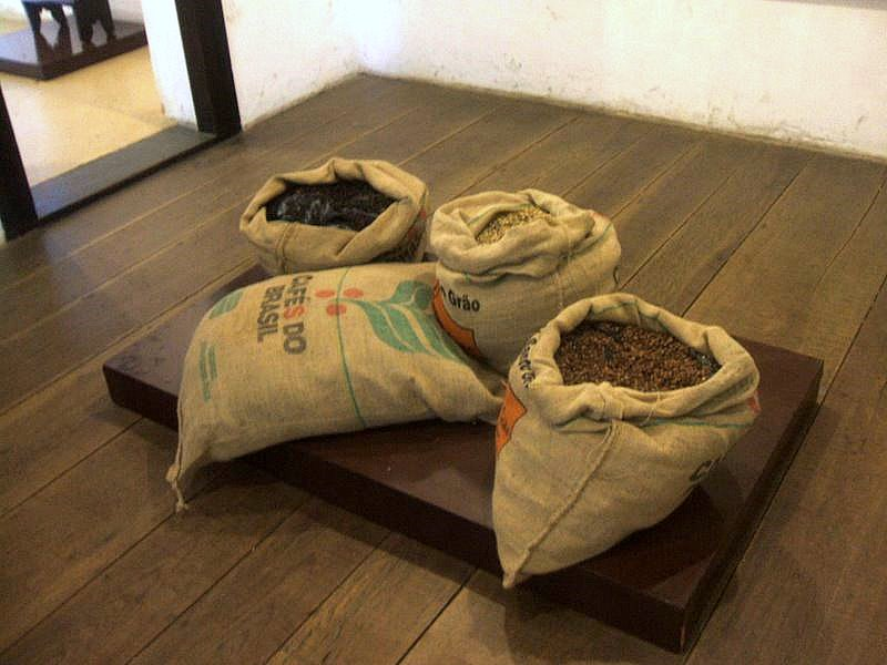 Sacos de café na Casa do Bandeirante, em São Paulo, Brasil.